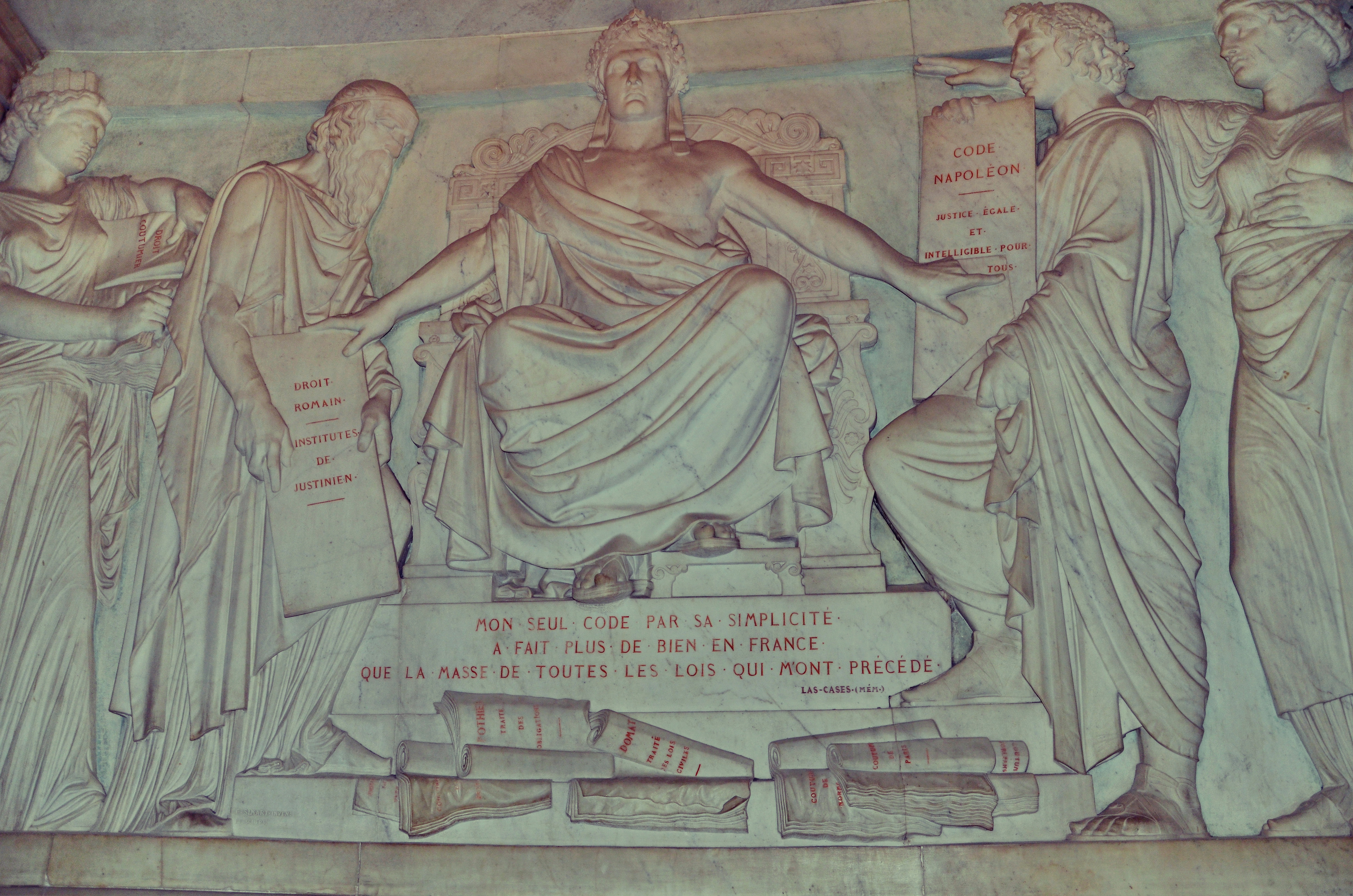 Hauts-relief de la crypte du tombeau de Napoléon